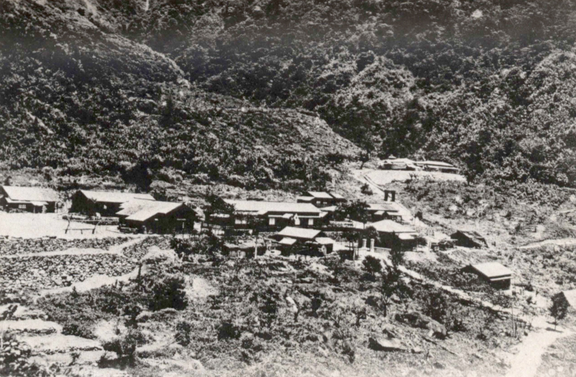 中文（台灣）: 台灣南投縣東埔溫泉